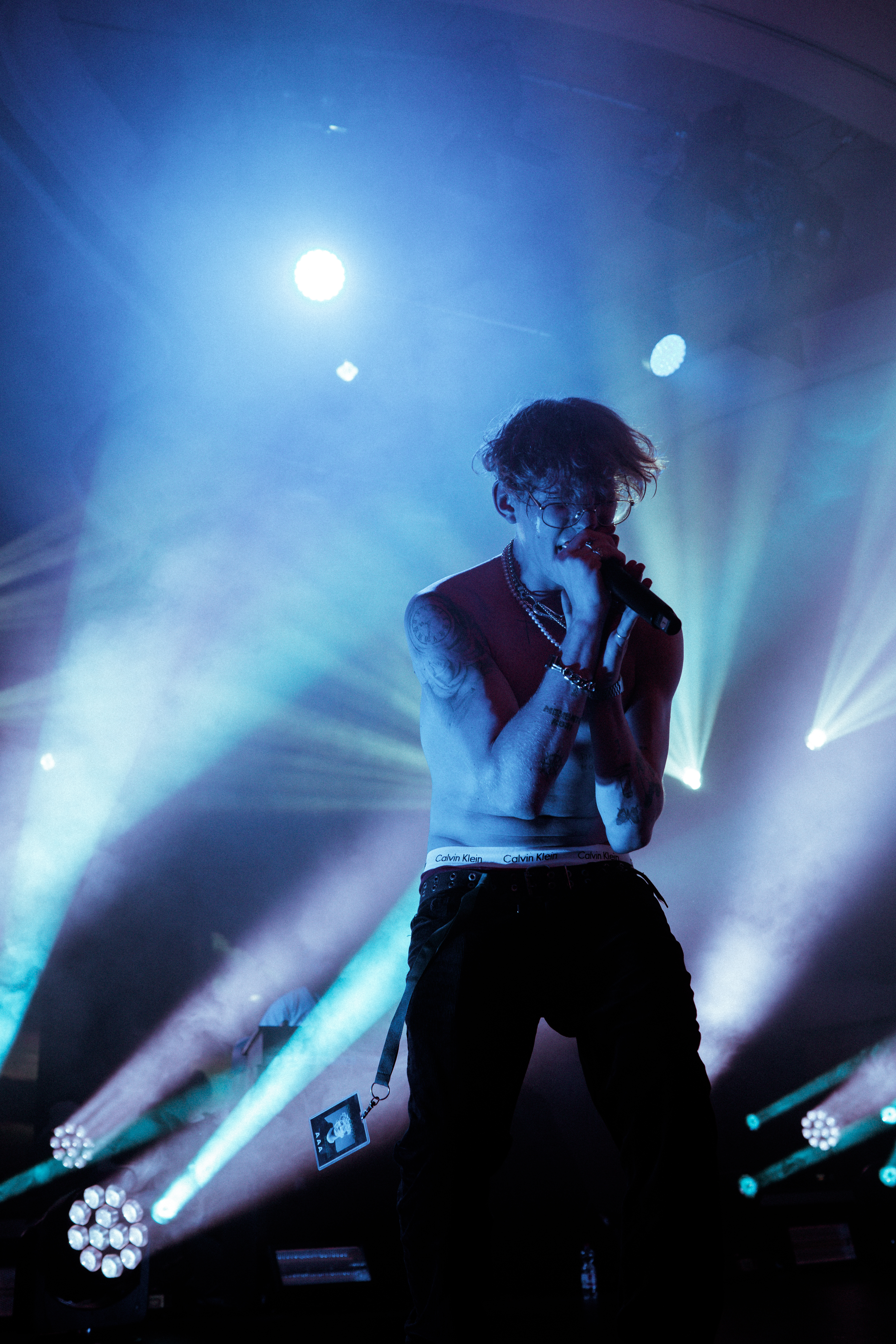 Live-Foto des Rappers Edo Saiya